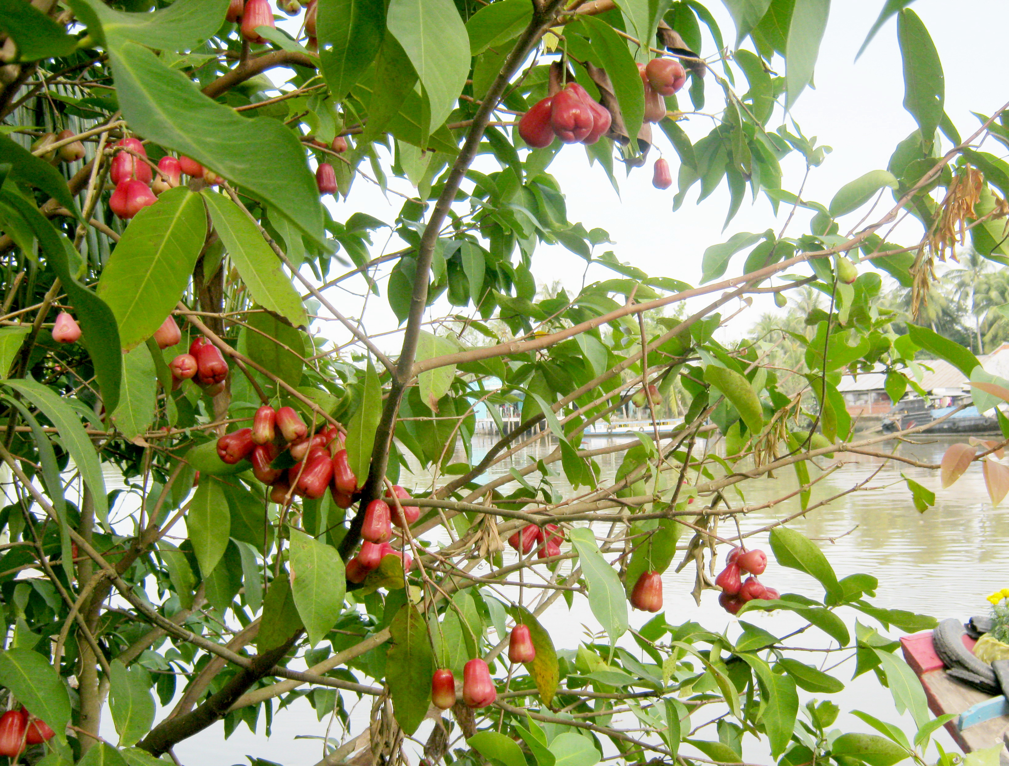 Mận có màu đỏ ở miền Nam Việt Nam.